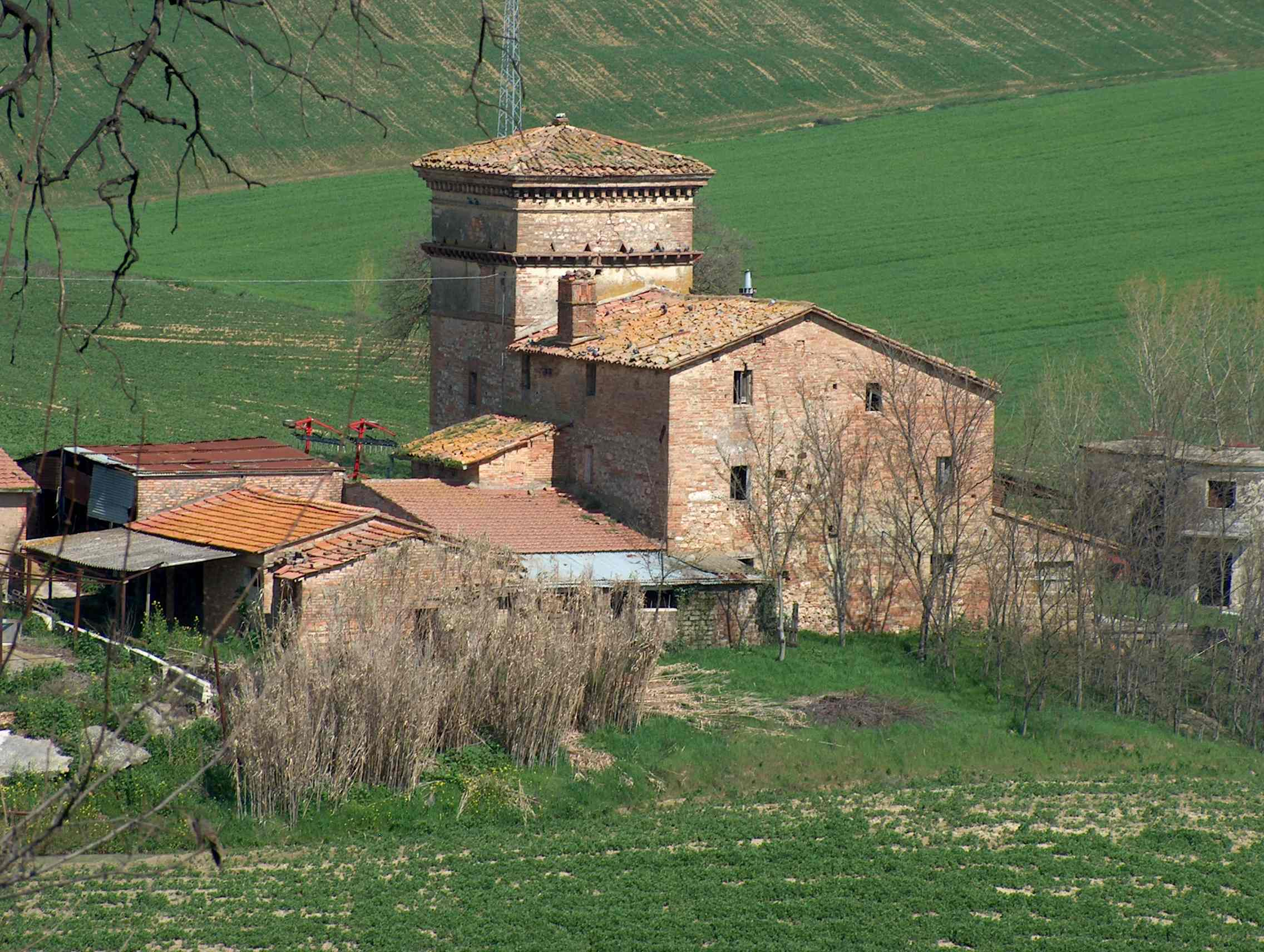 Foto della Chiesa di san Lorenzo Fonte Opera propria Data 12/03/08 Autore Me medesimo